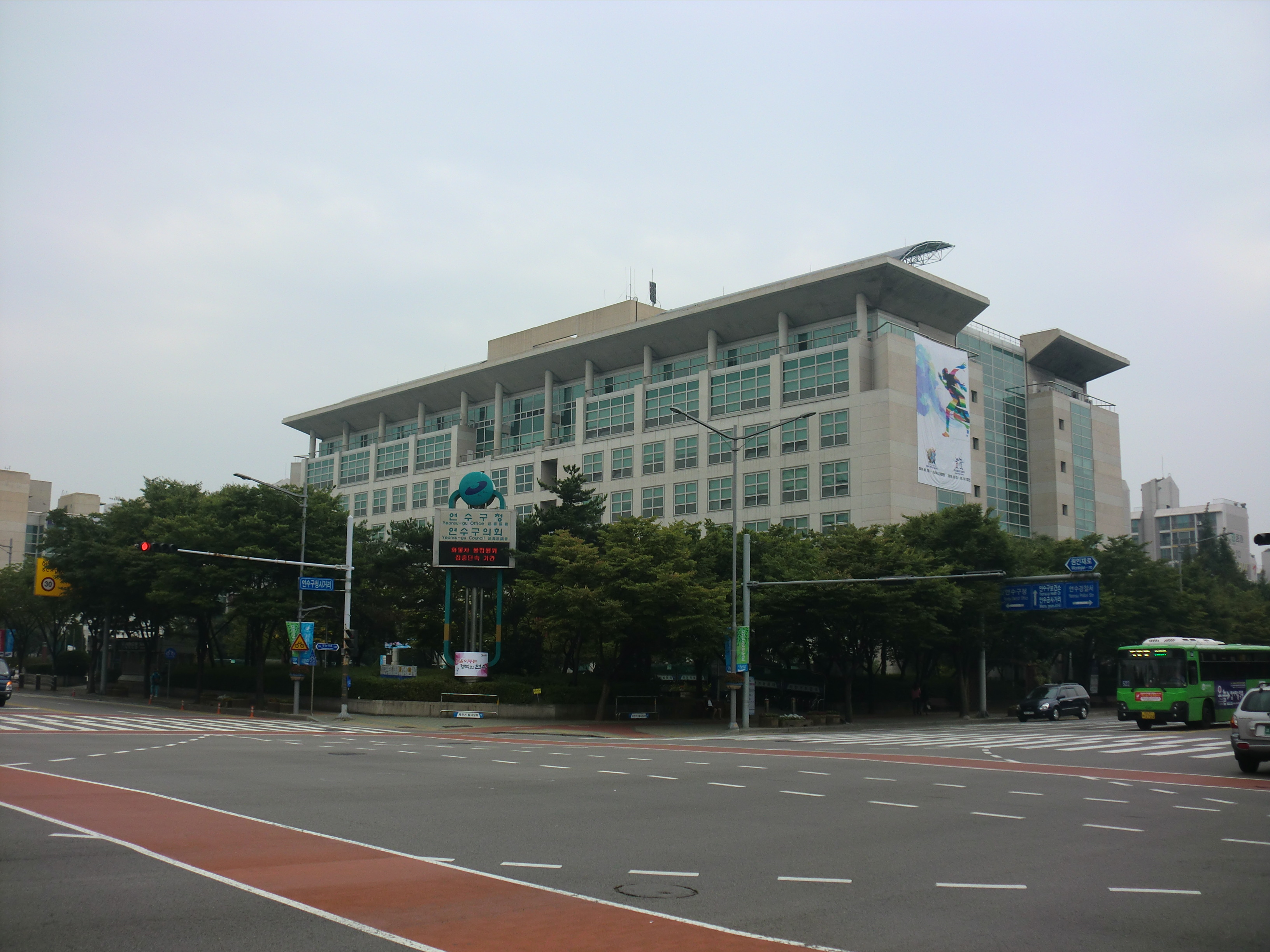 인천광역시 연수구에 있는 연수구청